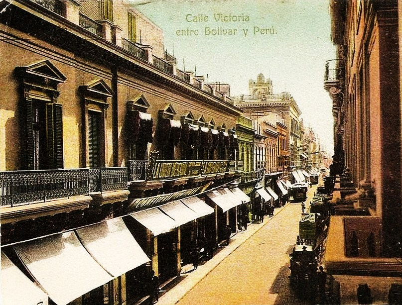 postal de la calle Victoria, barrio de Monserrat, Buenos Aires (c.1869)